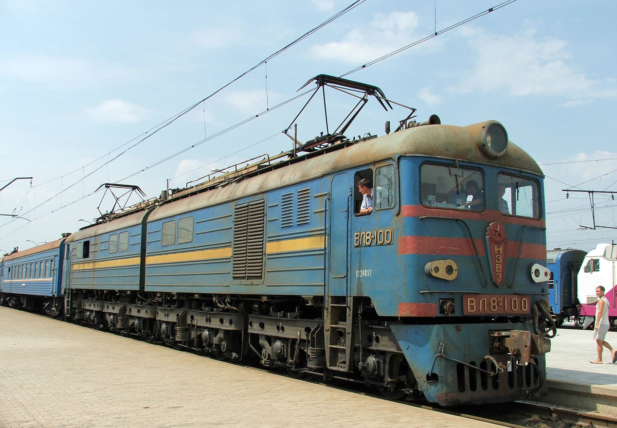 Electric locomotive